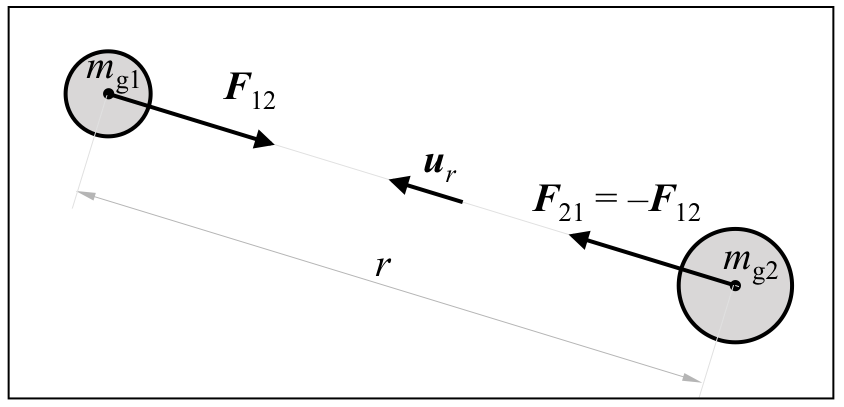 Bi masaren arteko erakarpen-indarrak erakusten dituen irudi eskematikoa.